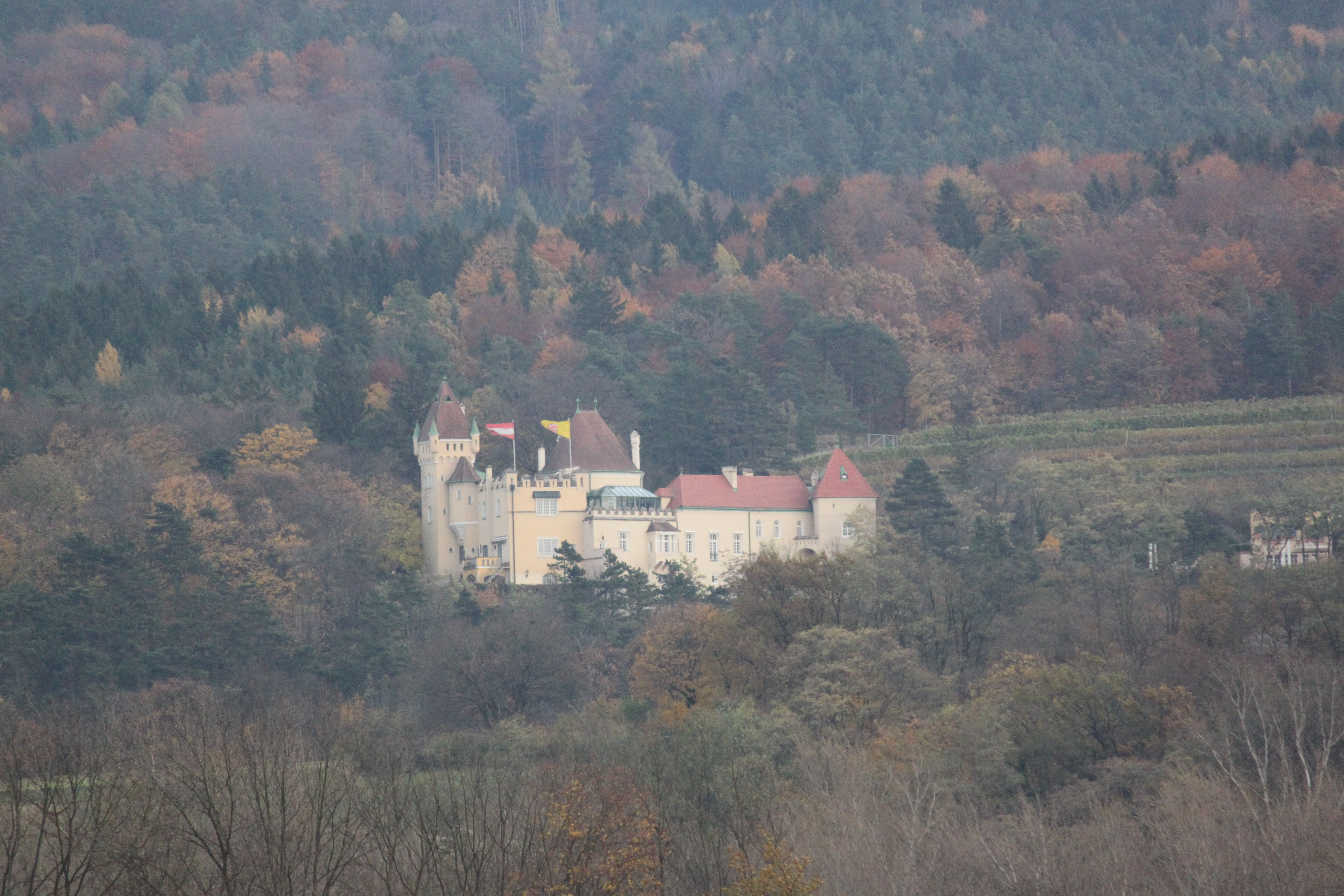 Schloss Eichbüchl, Ansicht von der Aspangbahn aus, zwischen Katzelsdorf und Lanzenkirchen